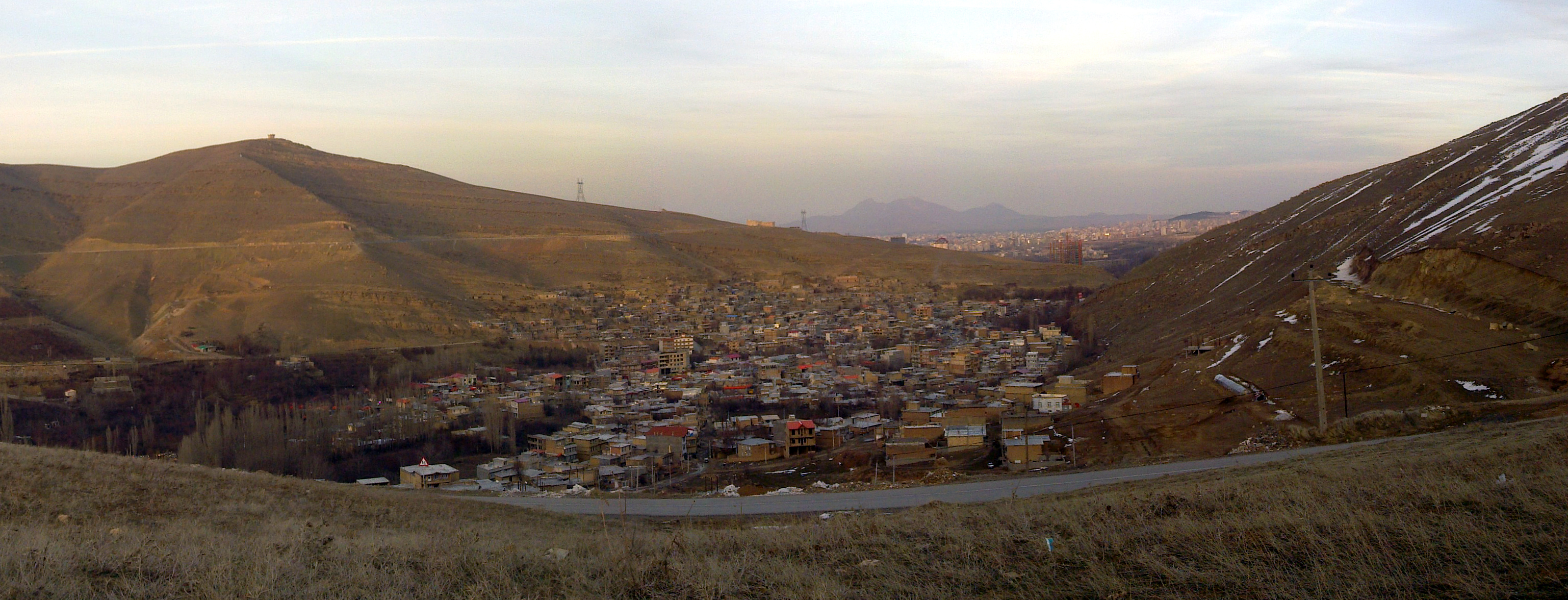 تۆرکجه: گزملی بند کندی شلمکان کندین یولوندان اورمو شهری دا گوروشور